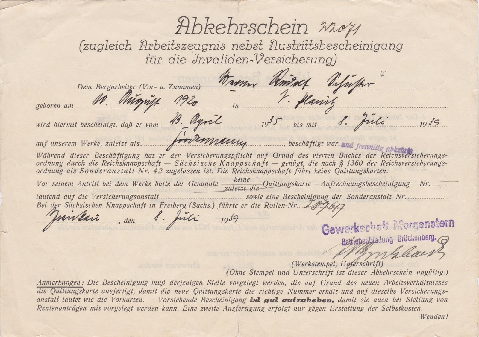 Abkehrschein der Gewerkschaft Morgenstern von 1939